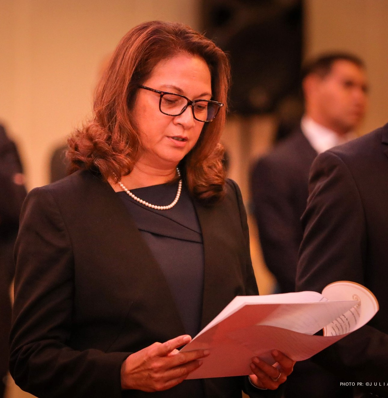 Botschafterin Inês Maria de Almeida bei der Vereidigung